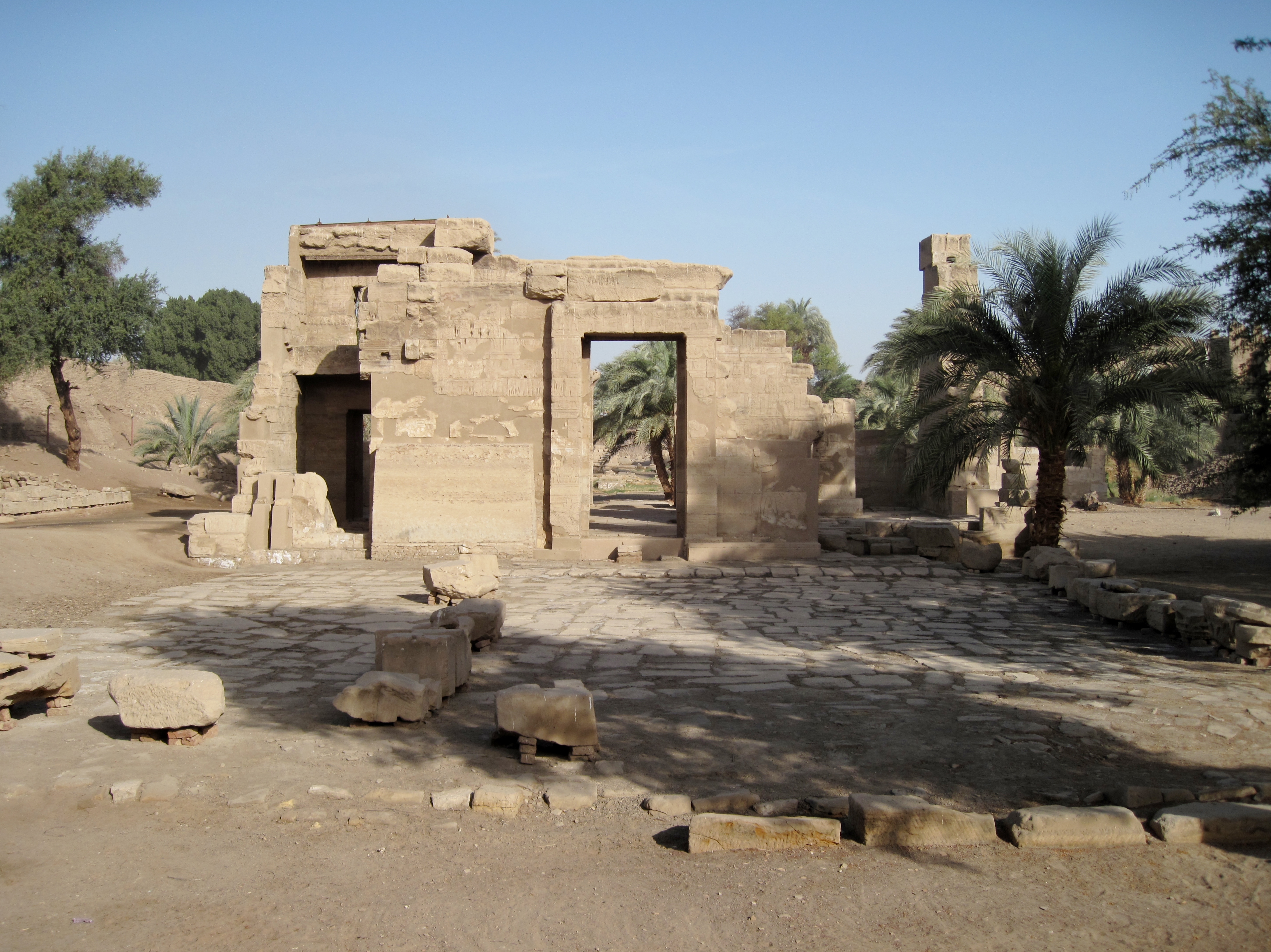 Blick auf den Month-Tempel von el-Tod, Ägypten